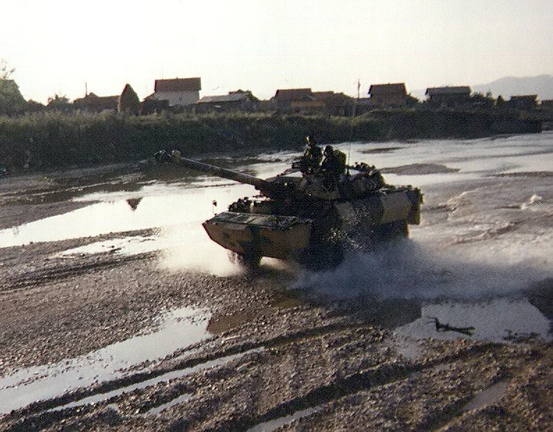 Passage d'un gué avec un AMX 10 RC dans la banlieue de Sarajevo. Photo prise en 1997 lors d'une mission SFOR du 3ème Régiment de Hussard.